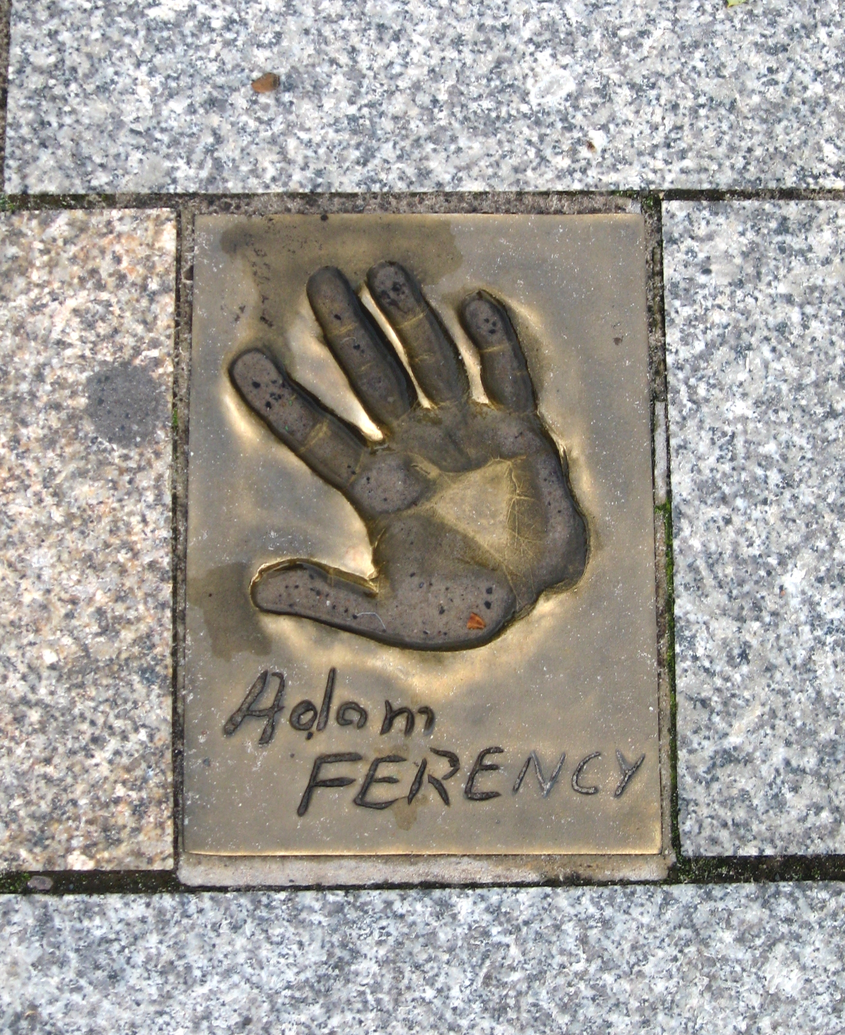 Aleja Gwiazd w Międzyzdojach - Adam Ferency